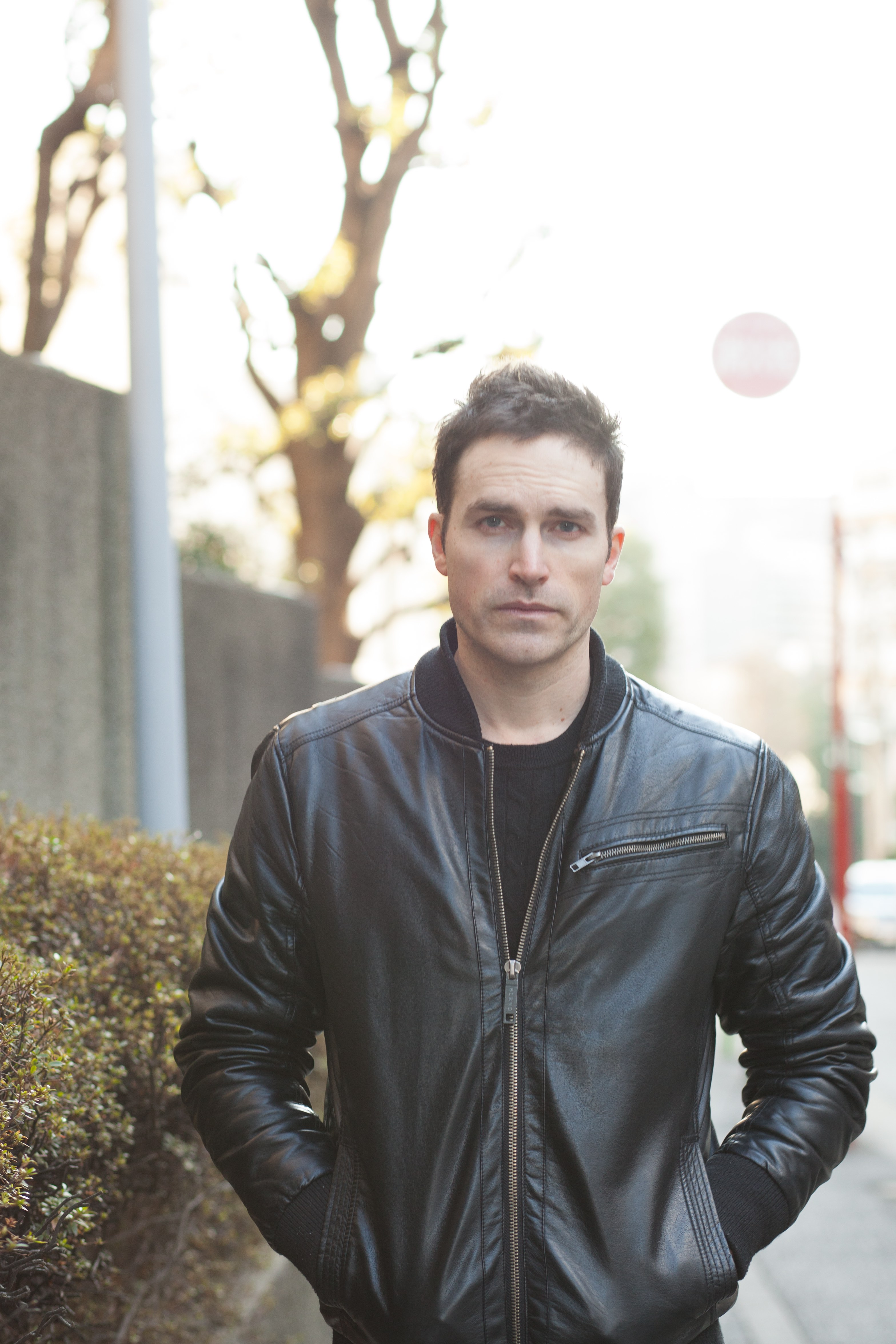 ジェフリー・ロウ 写真